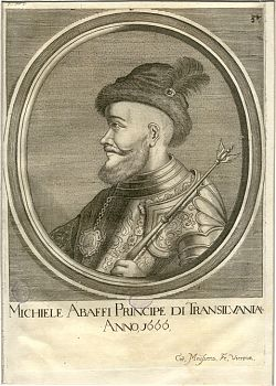 Kupferstich: Michael I. Apafi ( (1632-1690) Fürst von Transsylvanien/Siebenbürgen